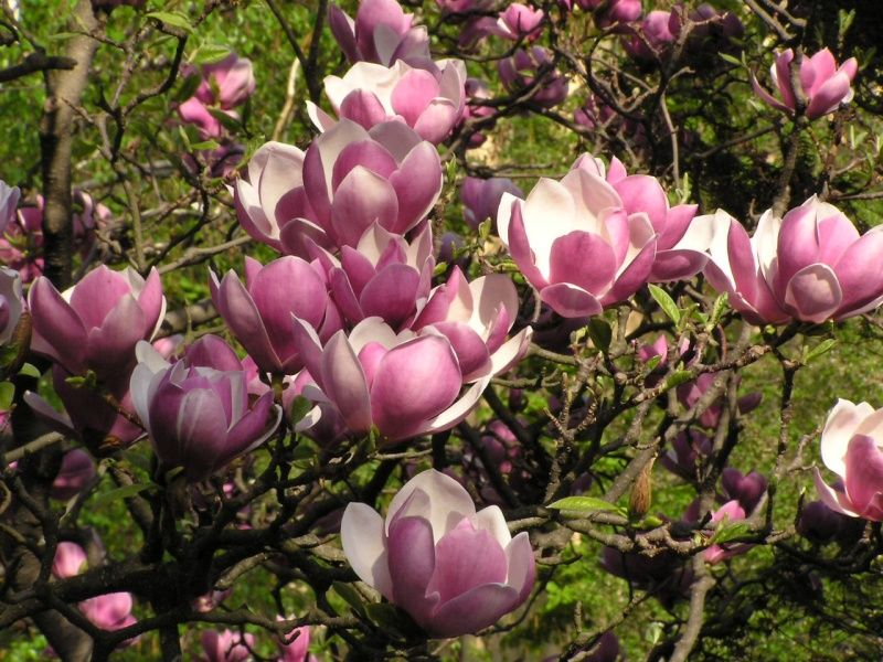 šácholan soulangeův